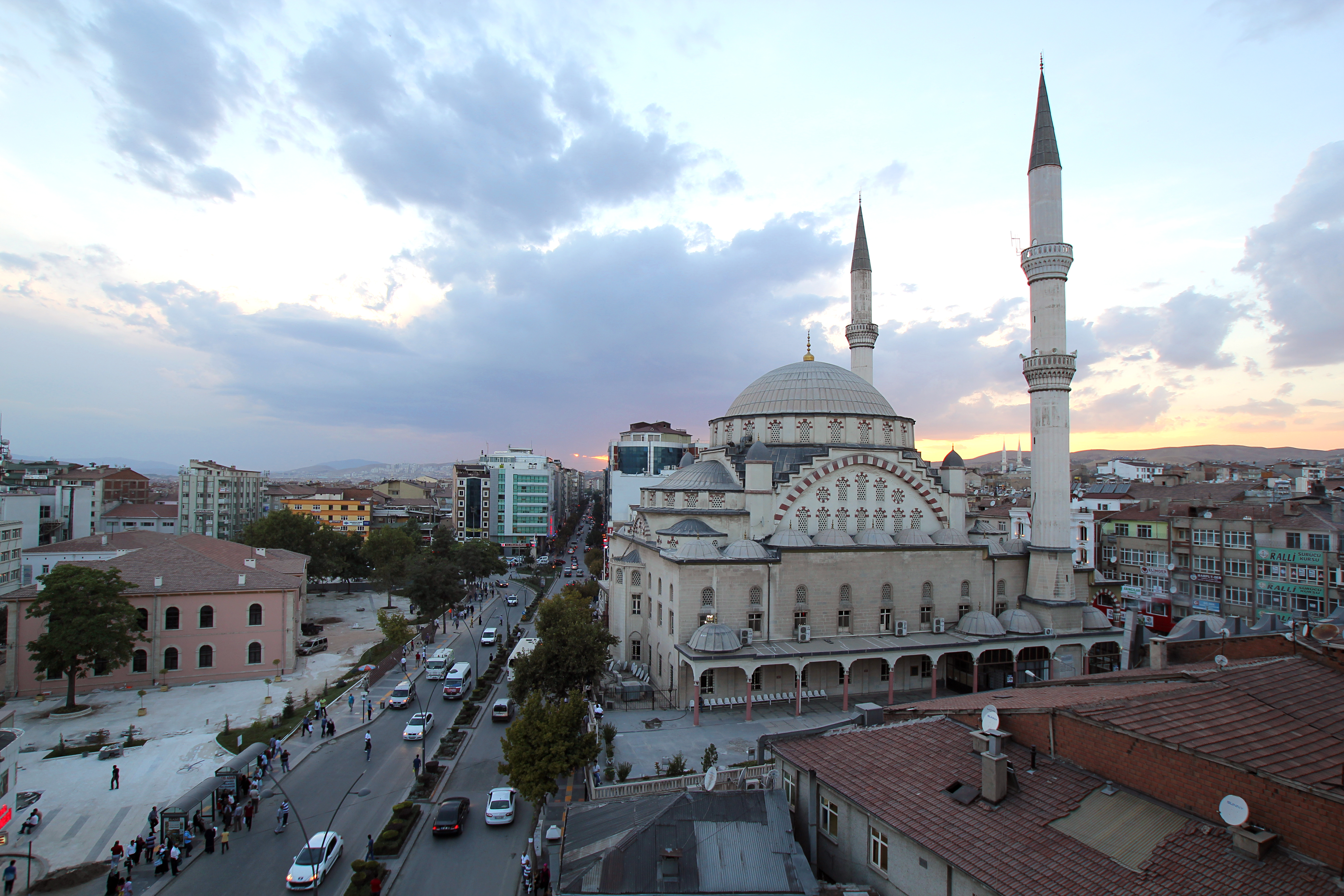 Izzet-Pascha-Moschee und Gazi Caddesi in Elâzığ, Türkei